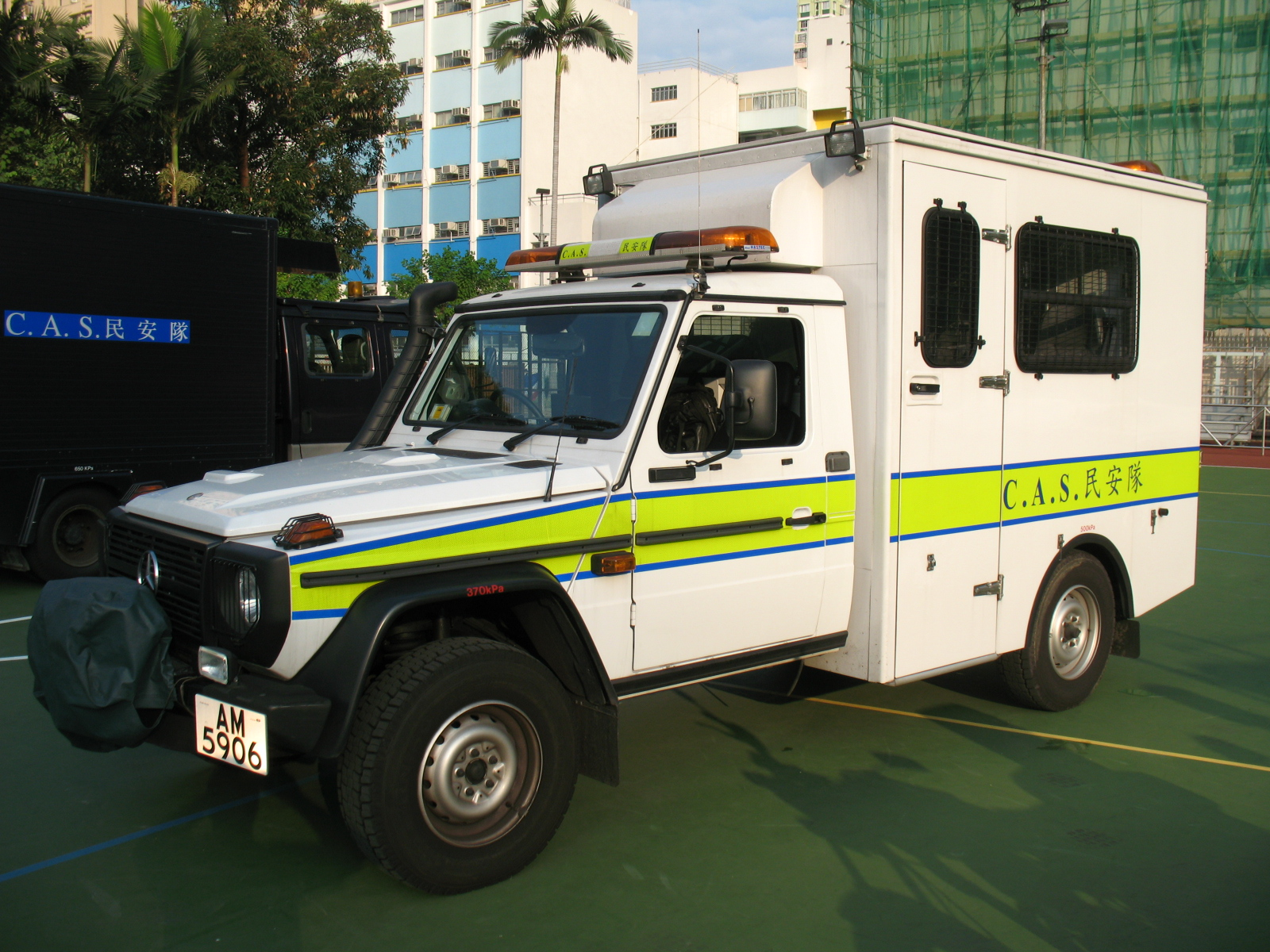 中文(香港)：民眾安全服務隊旗下的山嶺拯救車，是最新一代型號為平治G級300CDI越野車底盤，主要用作山嶺拯救工作，比上一代舊款山嶺拯救車的性能更佳。而其車身拉花則參考了皇家空軍攀山搶救隊旗下的拯救車輛。